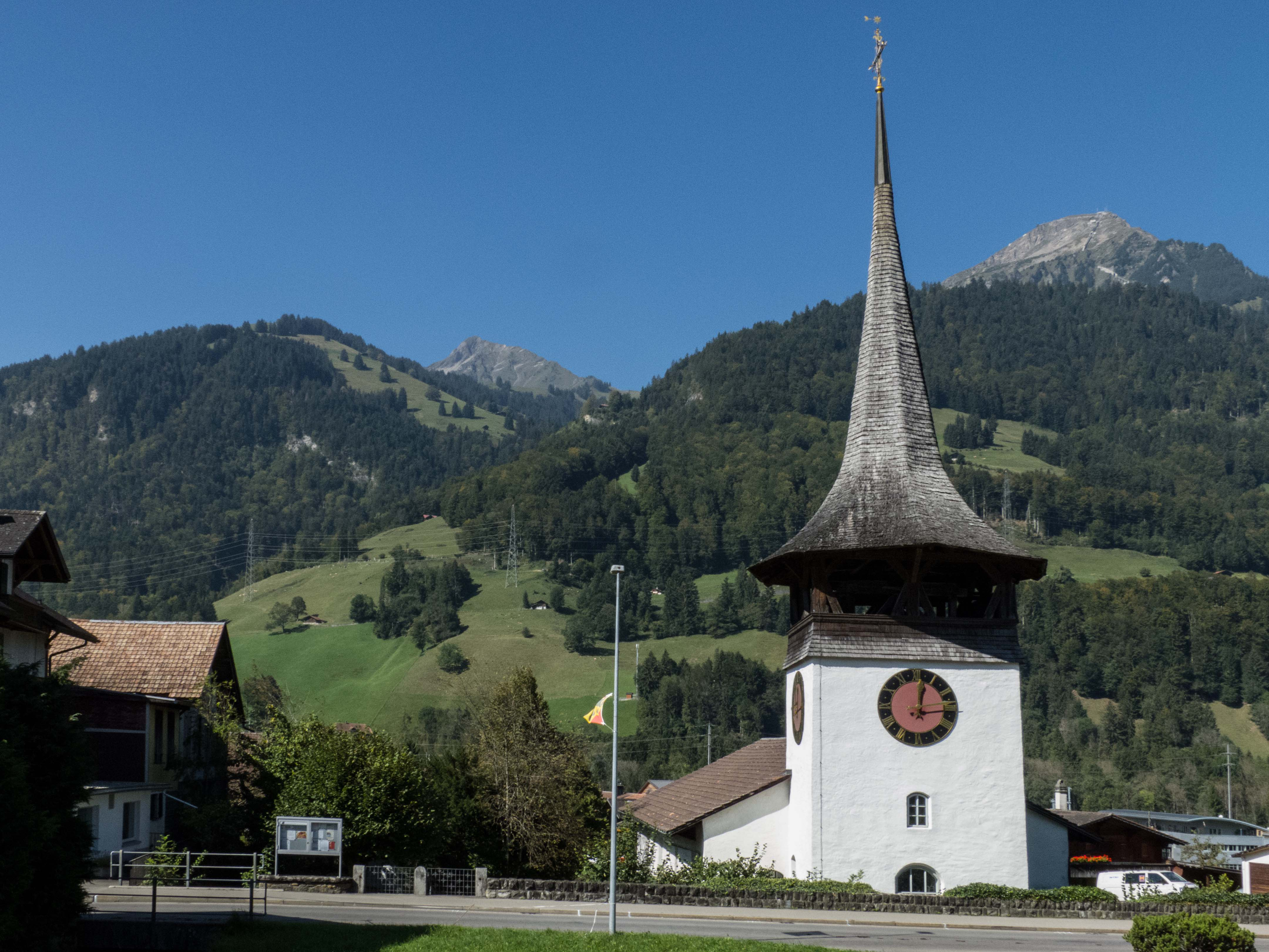 Reformierte Kirche mit Niesen